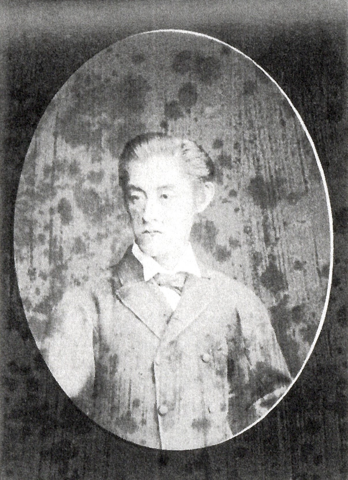 柳沢徳忠の肖像写真。